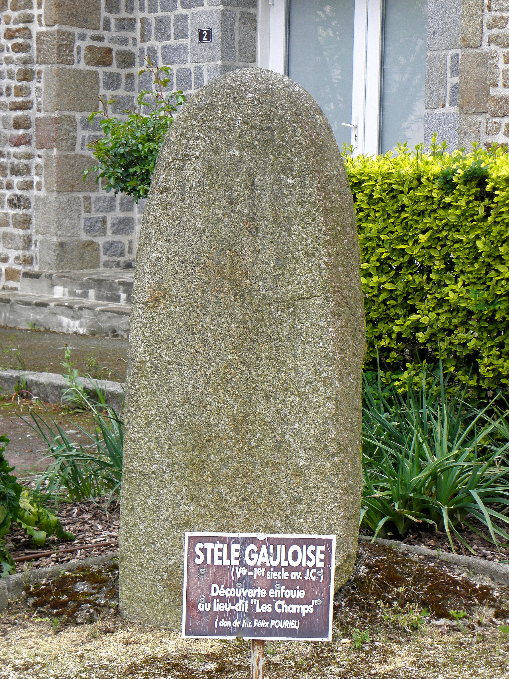 Stèle gauloise, place de l'église à Landivy (53).